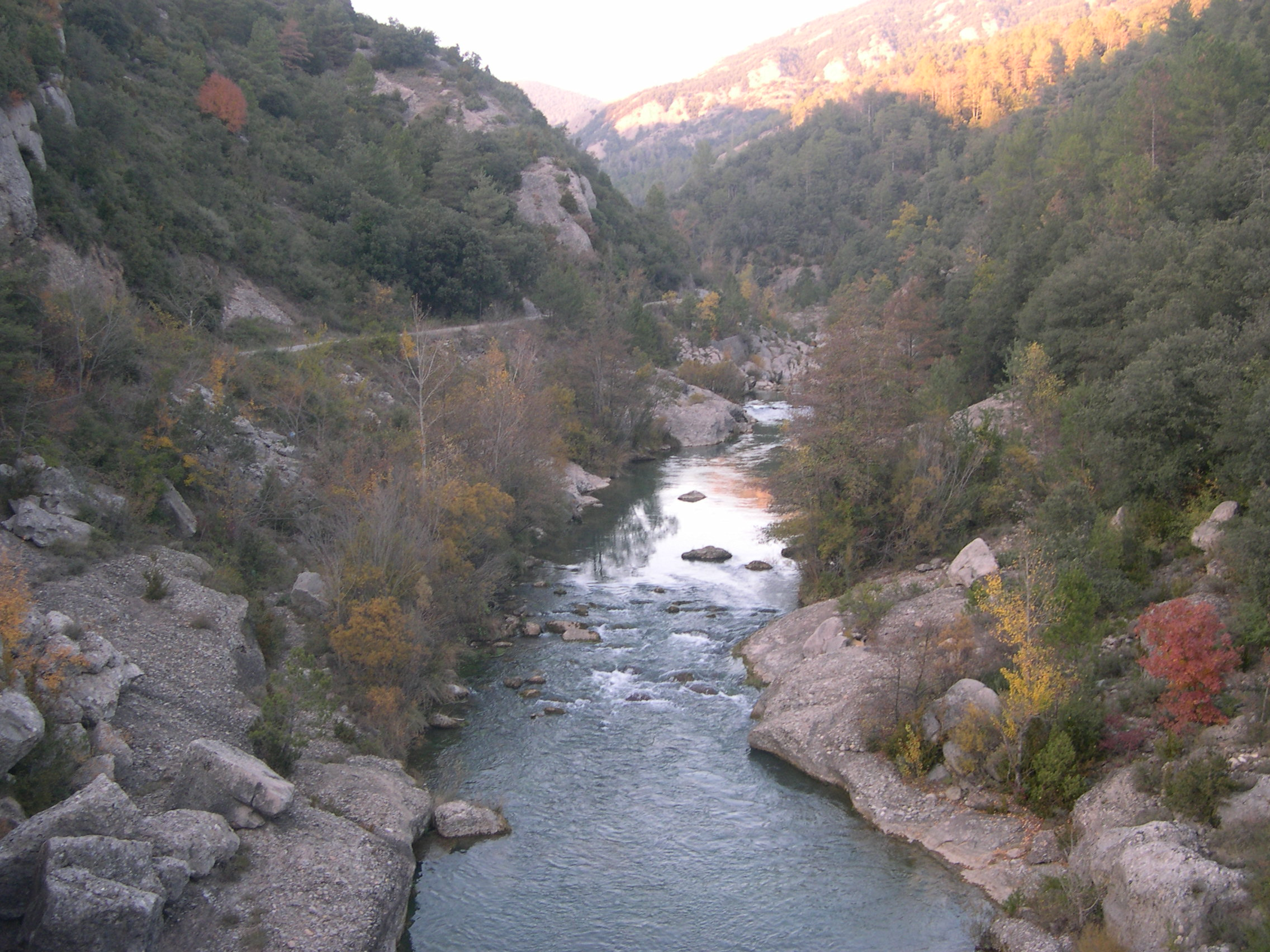 Serra de Picancel (Berguedà) (La Quar, Vilada, Cercs). This is a a photo of a natural area in Catalonia, Spain, with id: ES510186 Object location42° 06′ 36″ N, 1° 56′ 24″ E